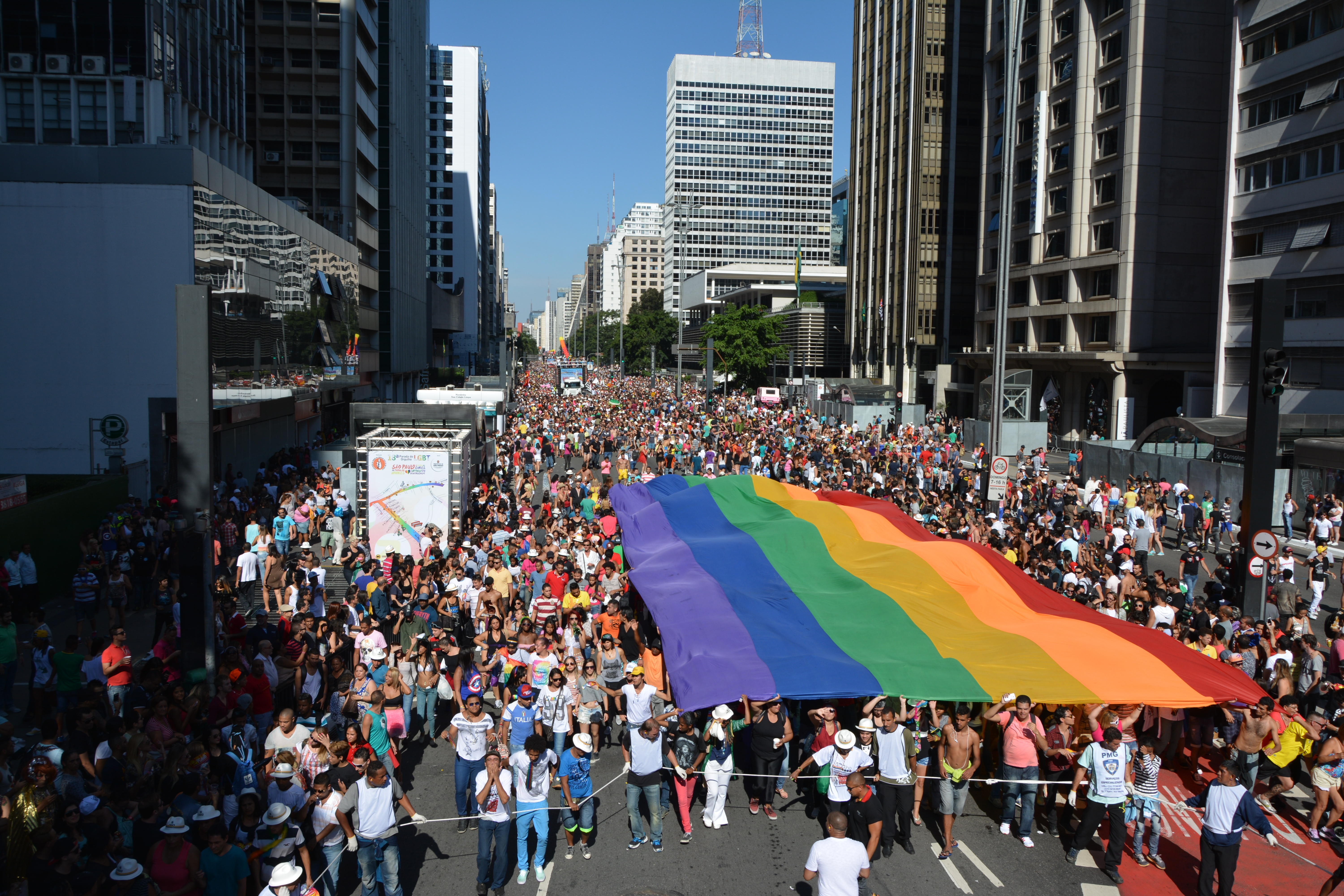 São Paulo's 18th annual LGBT Pride Parade 2014 - Parada Gay - Gay Pride. Read more here